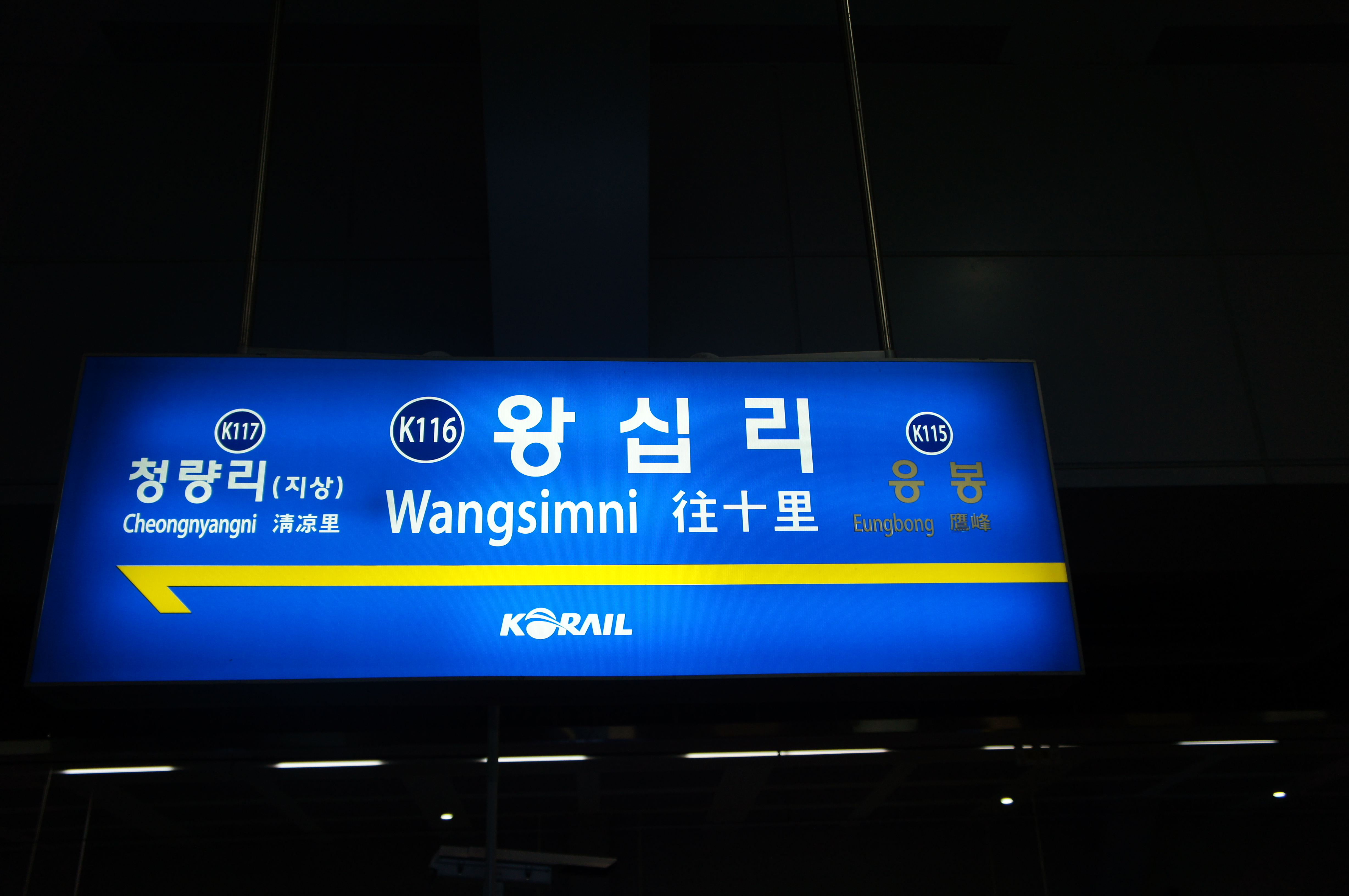 왕십리역 중앙선 역명판